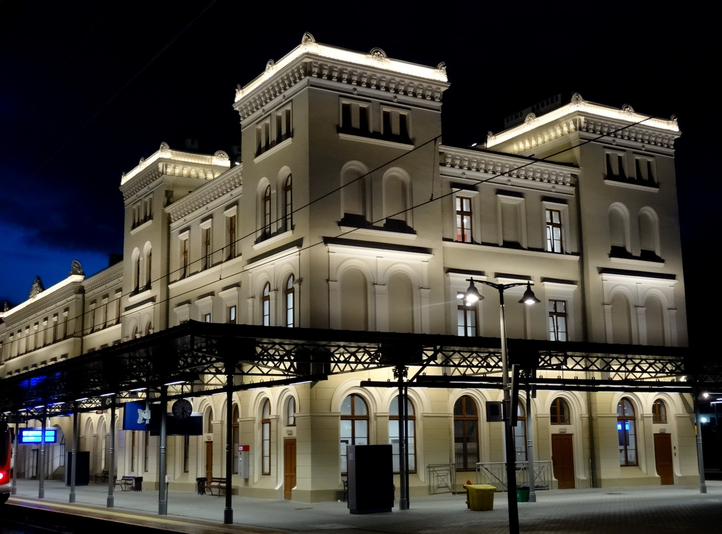 Dworzec kolejowy Bydgoszcz Główna - odrestaurowany terminal wewnętrzny z 1860 roku